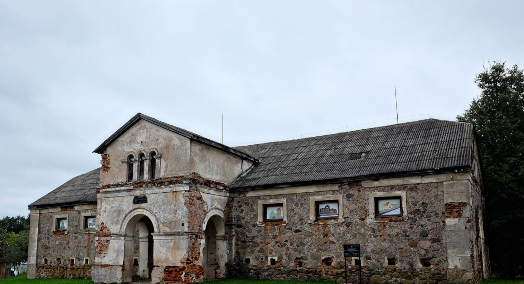 Subačiaus magazinas